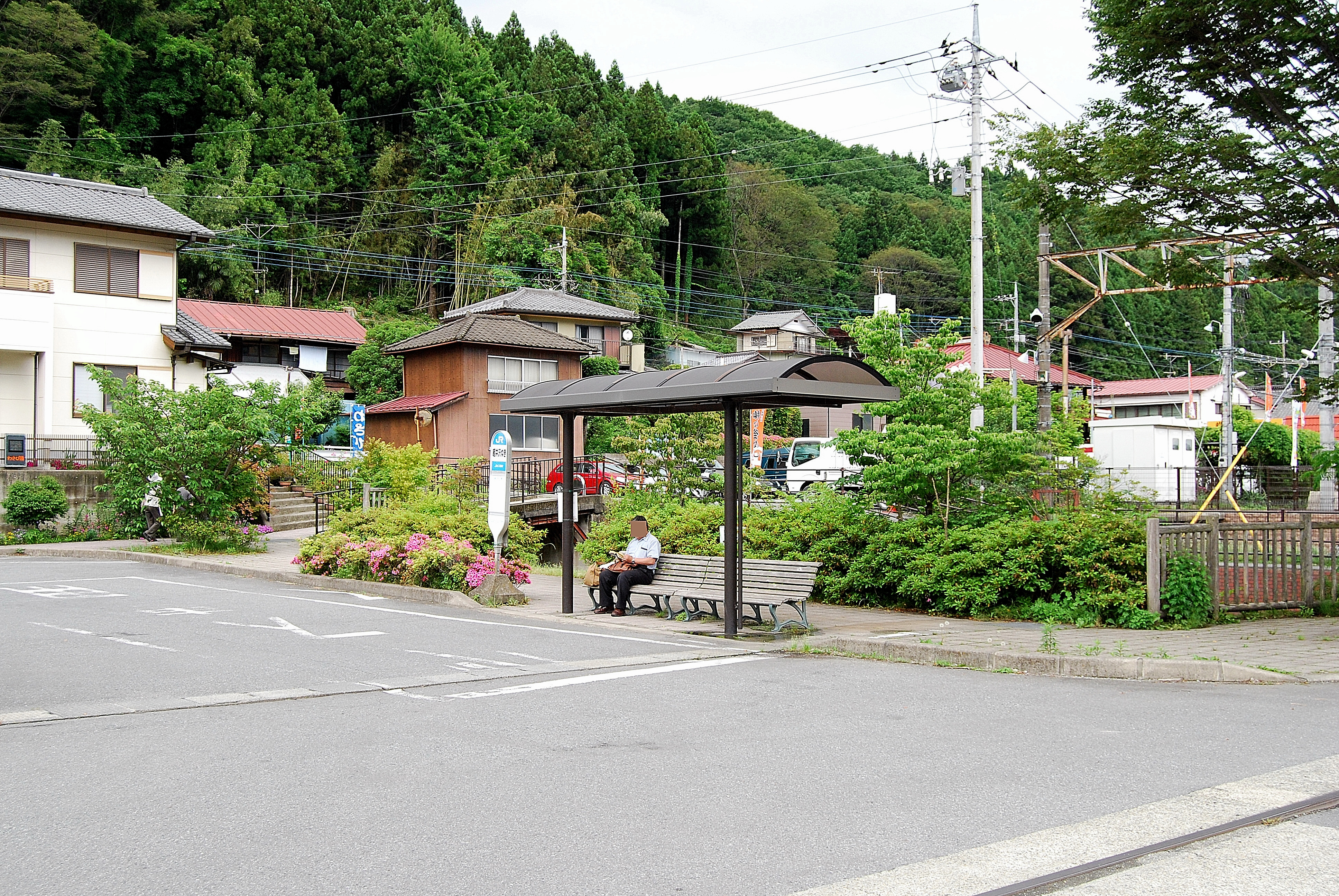 横川駅にある、JRバス関東碓氷線の横川駅バス停留所。